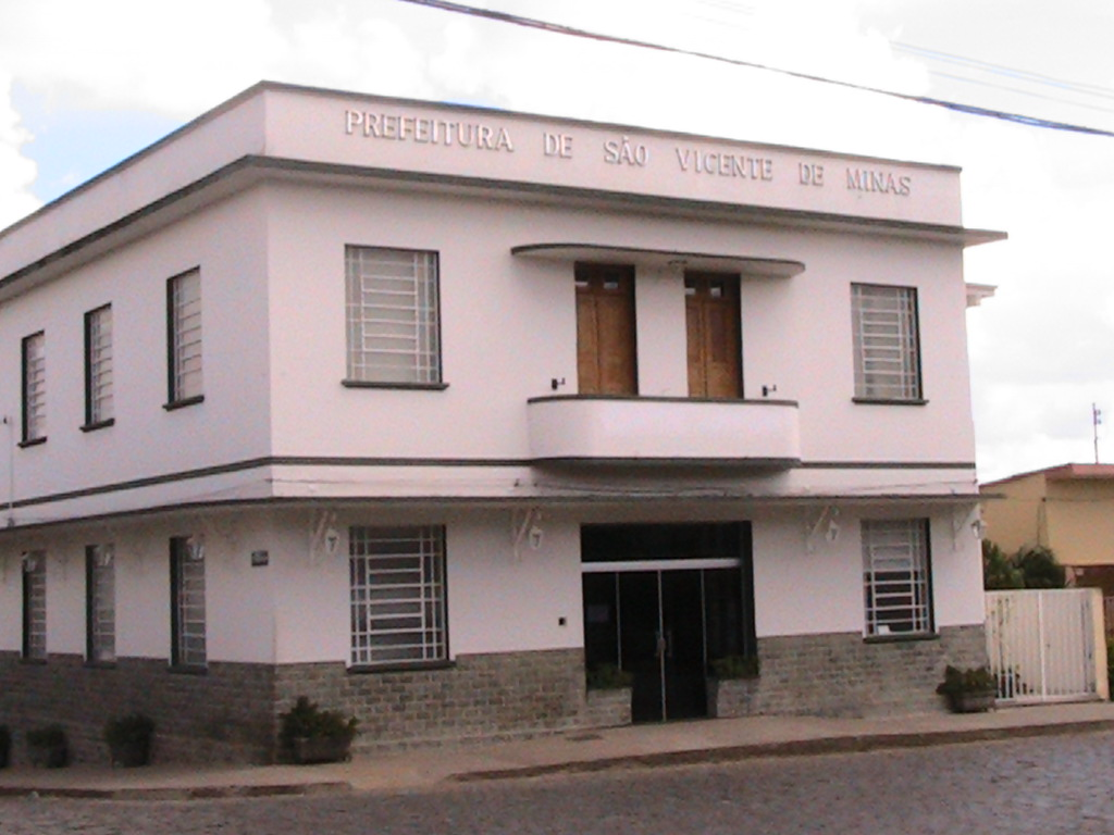 Prefeitura Municipal de São Vicente de Minas, Minas Gerais, Brasil.